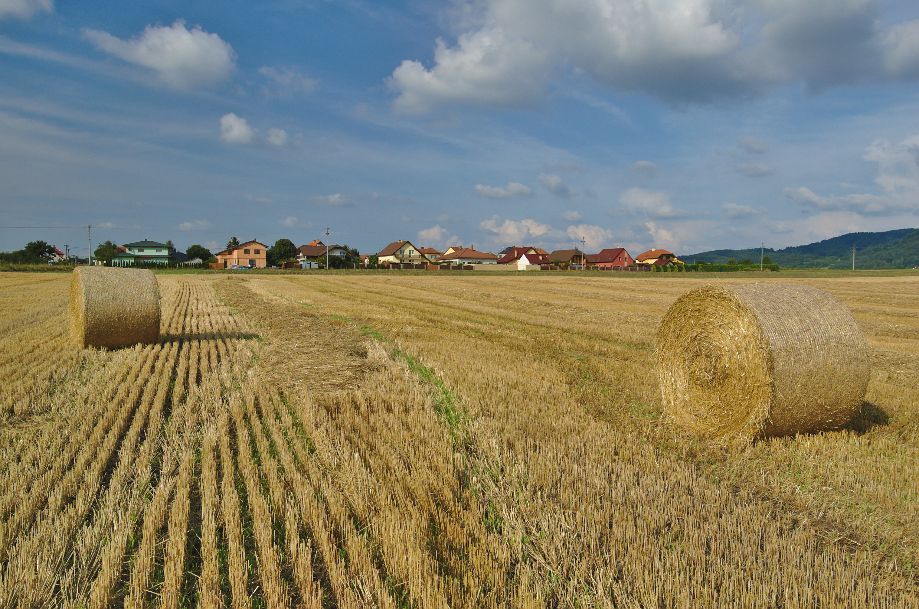 Pohled na obec z jihu, Sudice, okres Blansko